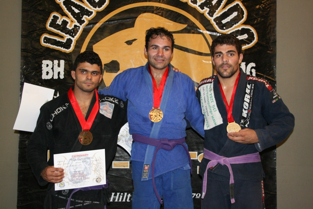 Podium da XII Copa Leão Dourado de Jiu-Jitsu, categoria faixa roxa peso médio: 1º Jack Jamil (centro); 2º Tede Velozo (dir.); 3º Phillip Augusto Diniz (esq.).